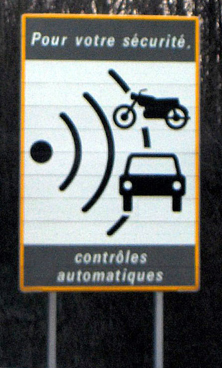 Panneau d'avertissement de radar automatique fixe. Contents 1 Summary 1.1 Légende 1.2 Auteur 1.3 Description technique 1.4 Source 1.5 Statut 2 Licensing 3 Original upload log Summary Photographie d'un panneau annonçant la proximité d'un radar automatique fixe (RN118). Légende Panneau d'avertissement de radar automatique fixe. Auteur Photographie effectuée par ©éréales Kille® ⌨ ☺ - 7 février 2005 à 17 h 18. Description technique Photographie prise avec un appareil numérique HP Photosmart R707 5,1 MPx. f/4,9, 1/125 s, ISO 100 Source Archives personnelles. Statut César Alexanian